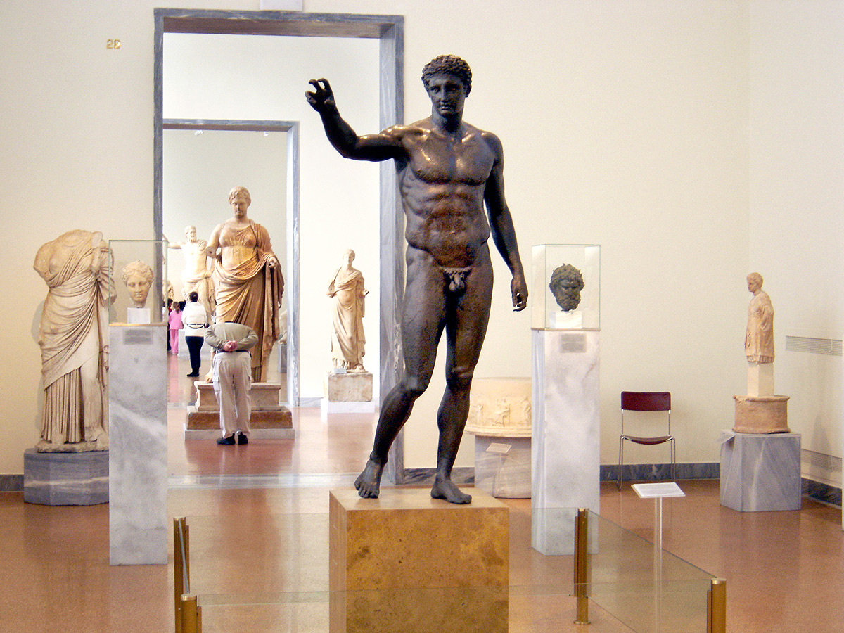 Interior of the National Archaeological Museum of Athens.